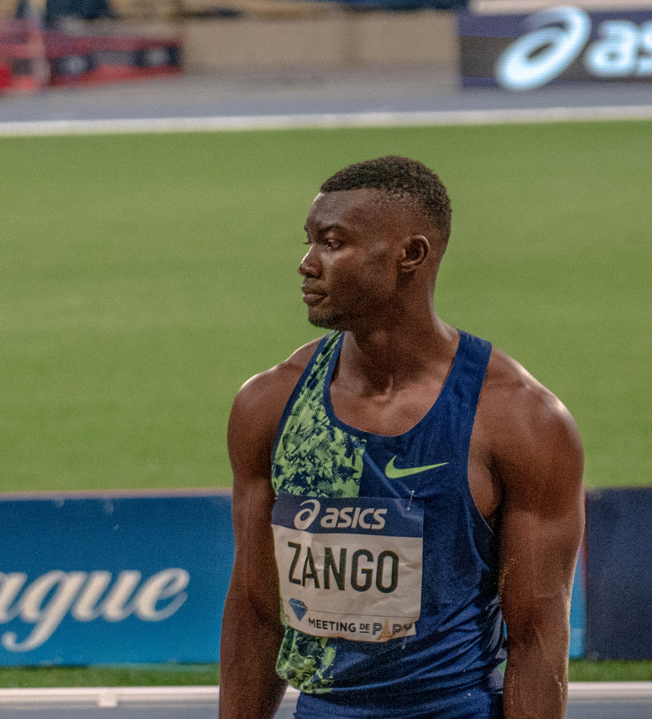 Meeting de Paris 2019 - Compétition d'athlétisme au stade Charlety - 24 août 2019